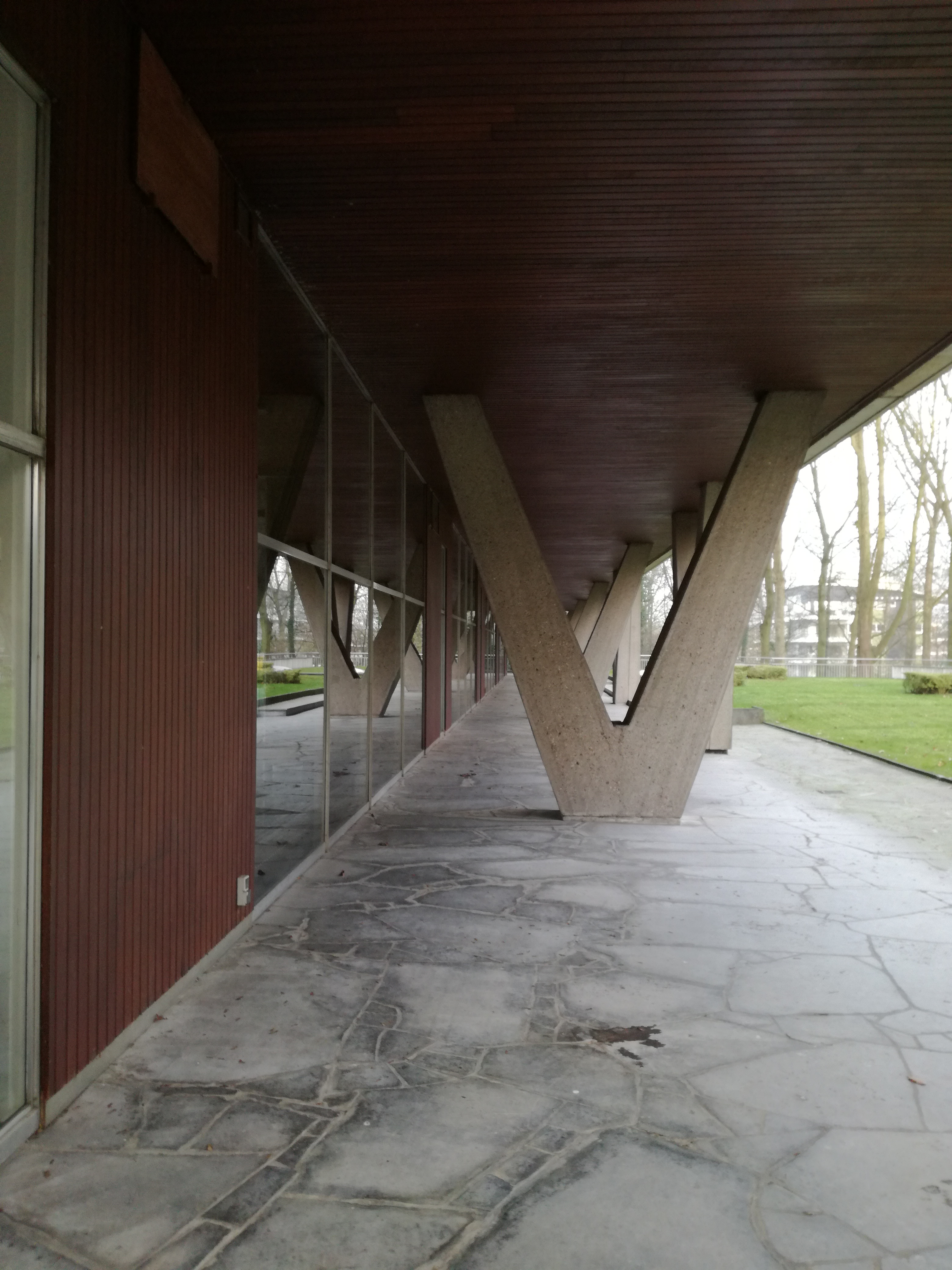 Piliers de la résidence Eden Green